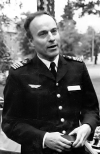 Göran Tode före detta flottiljchef för Västgöta flygflottilj (F 6) vid flottiljens 50-årsjubileum.